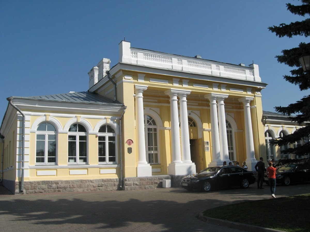 Кобрын.